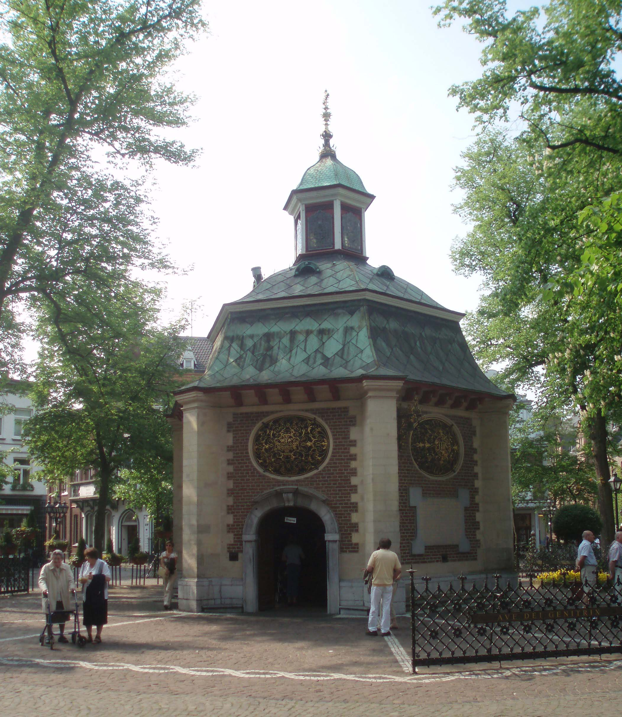 Kevelaer. Ripoarisch: De Gnadenkapell, usse.